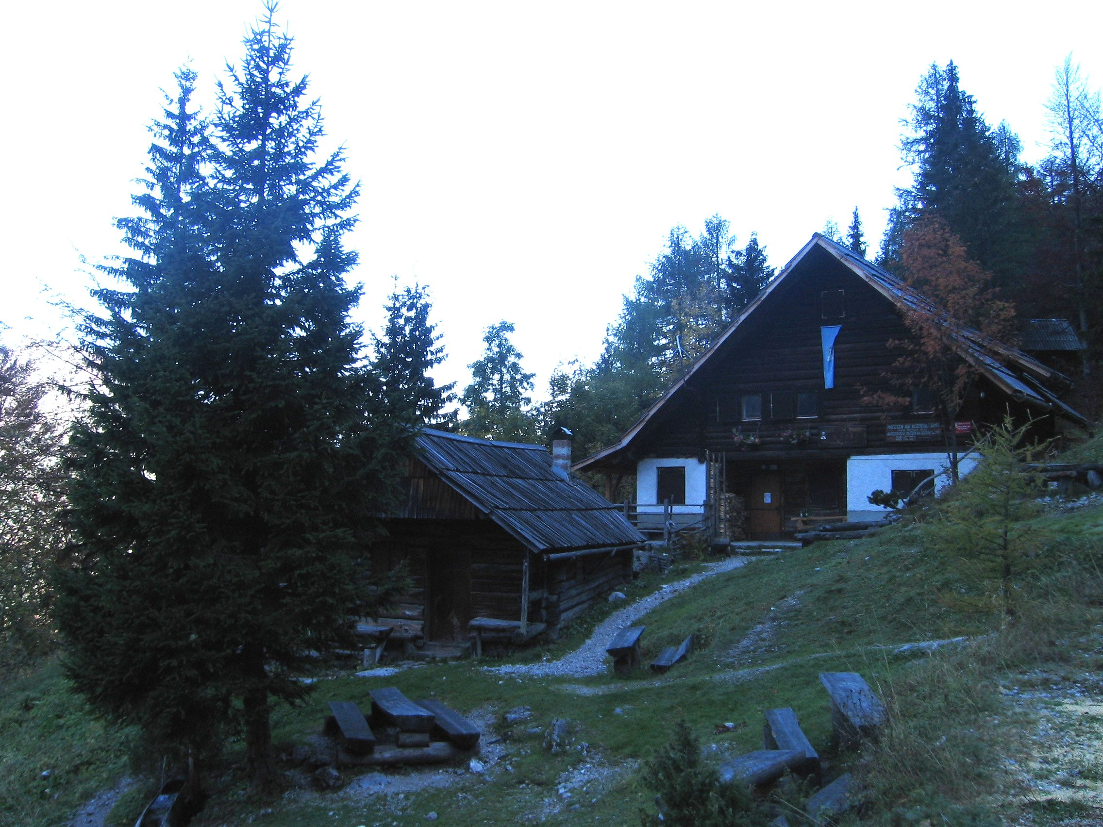 Hut on Klemenča jama under Mt. Ojstrica, Slovenia